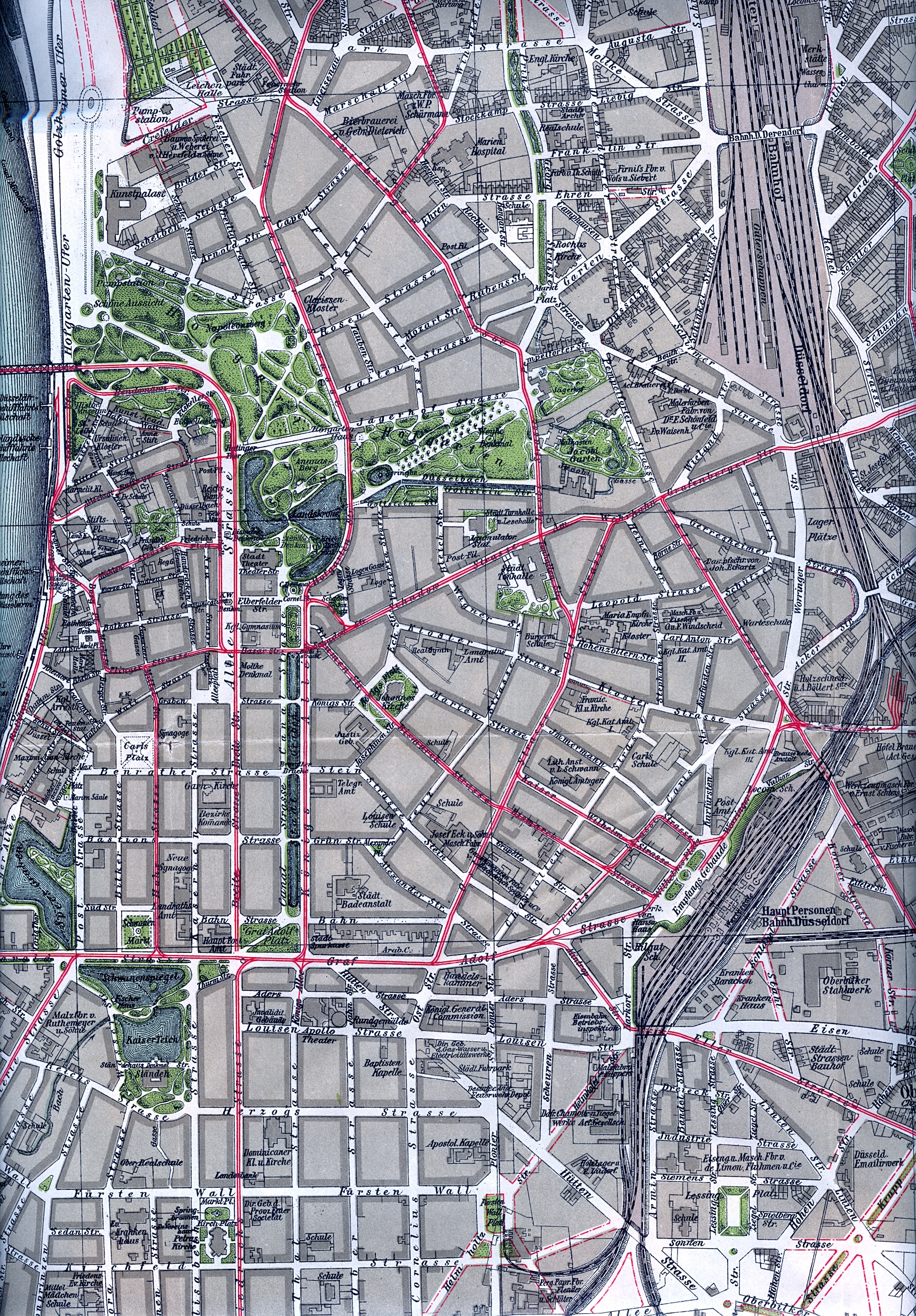 Stadtplan Düsseldorf aus dem Jahre 1903.jpg